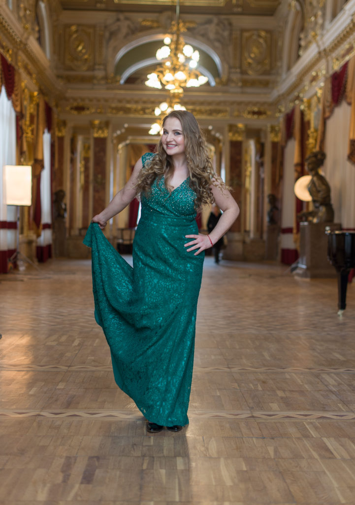 Оперна співачка Анна Носова у Львівській національній опері